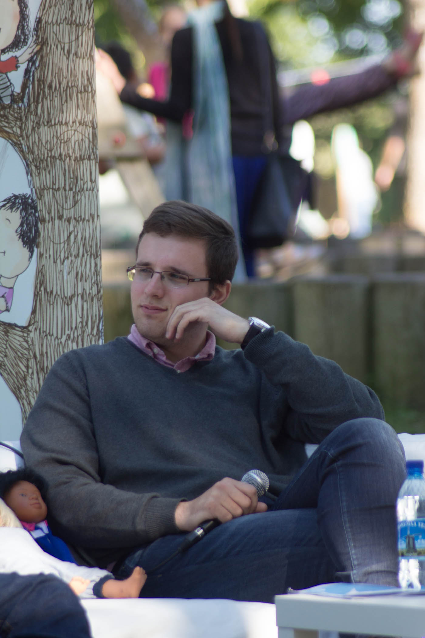 Sergei Metlev arutlemas teemal "Hallipassi lapsed - kui kaua nuheldakse vanemate patte laste nahal?".